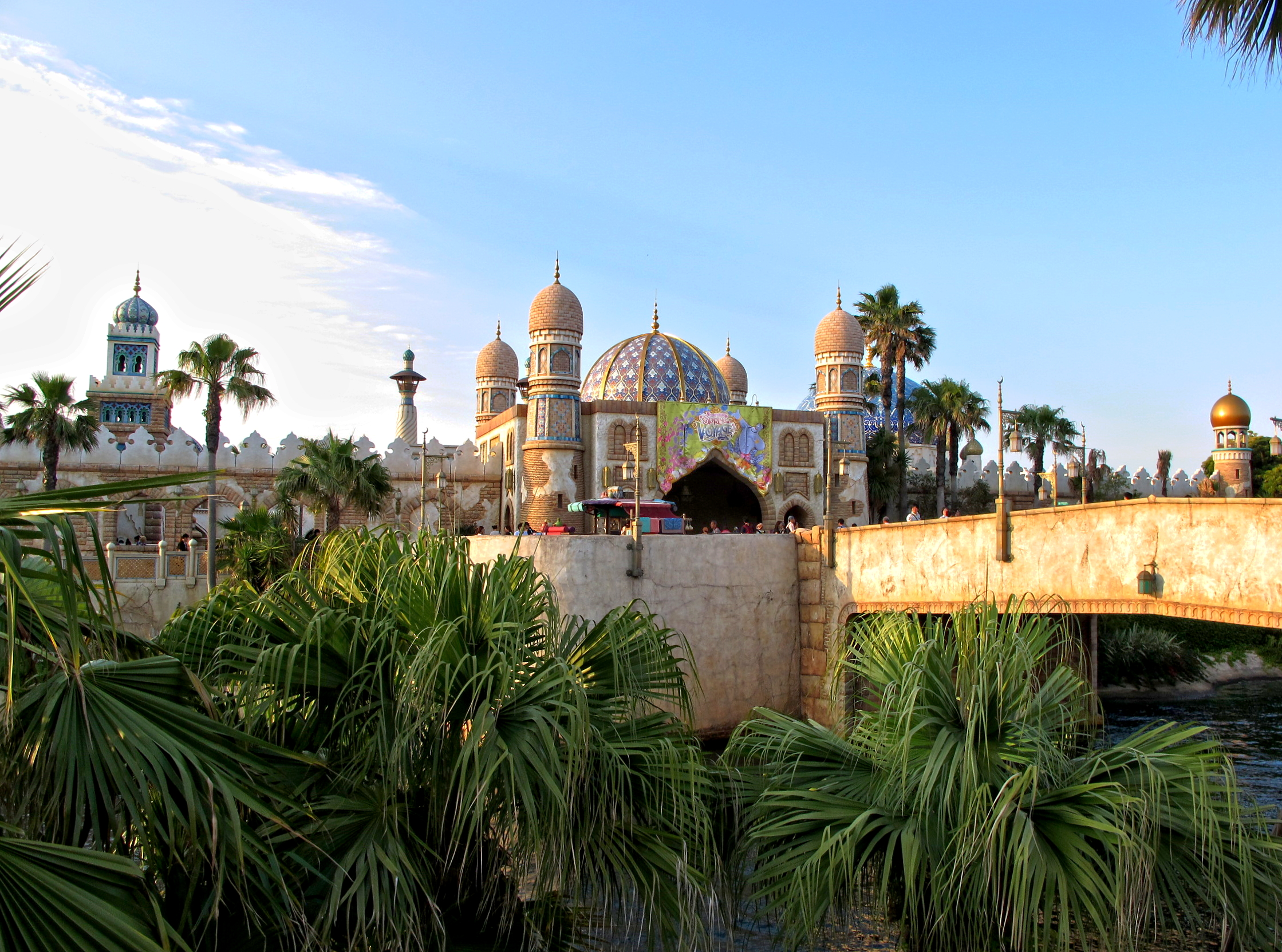 Tokyo DisneySea Arabian Coast